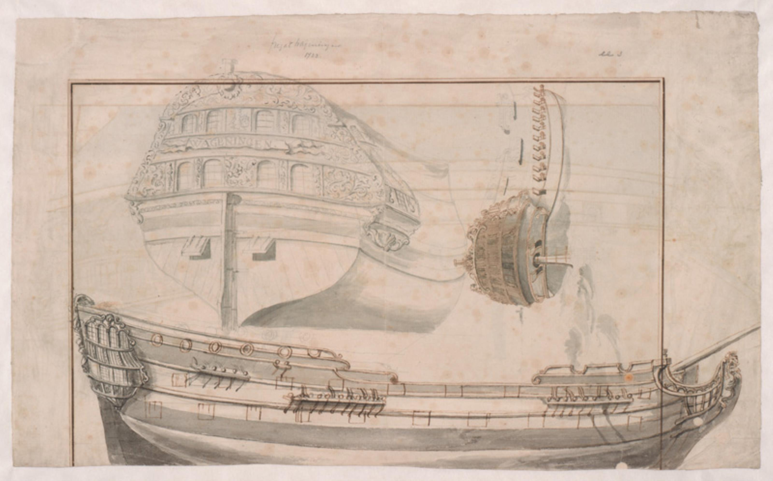 Zeichnungen der niederländischen Fregatte "Wageningen" 1723 gebaut von Gerbrand Slegt